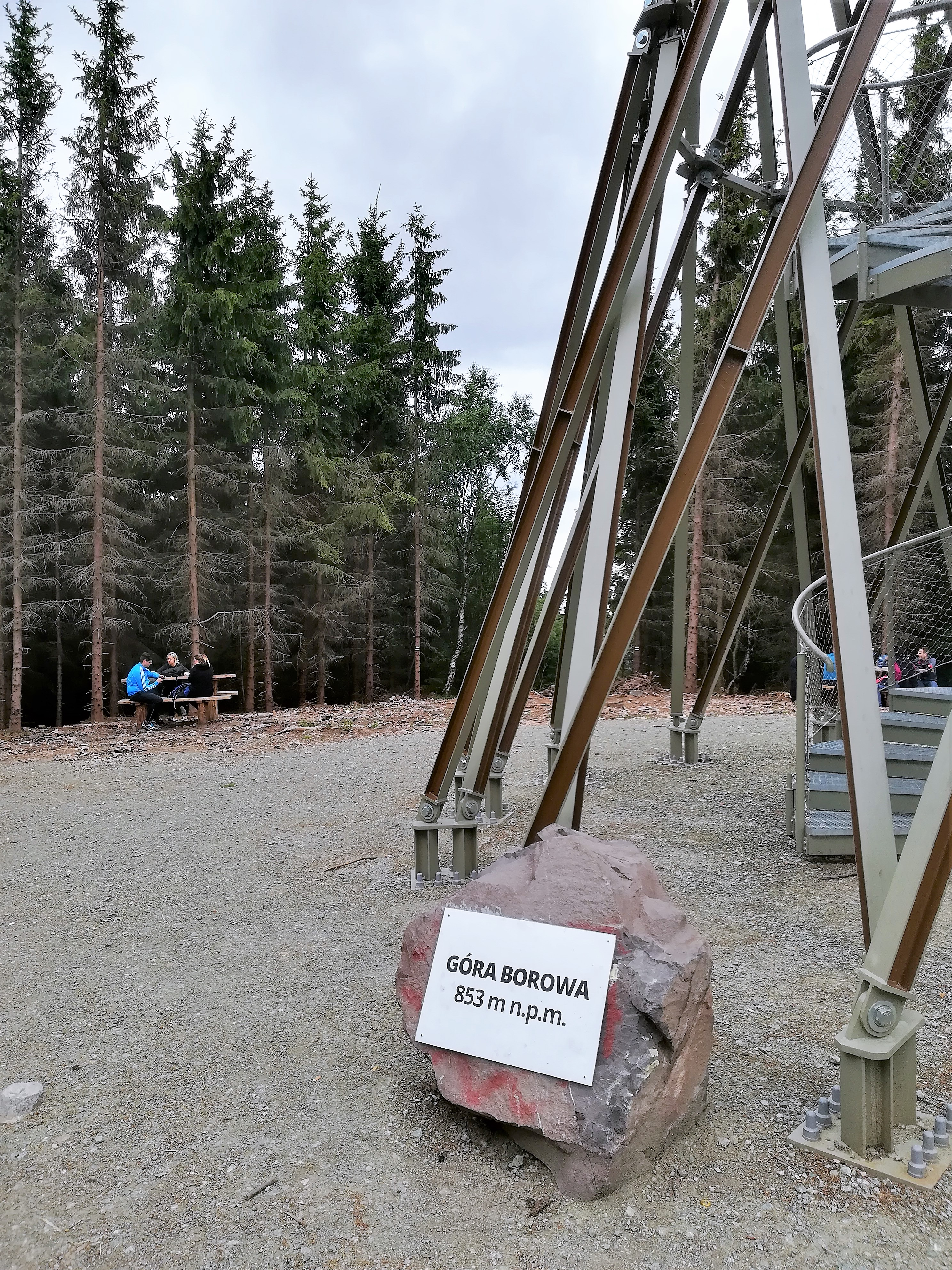 Wieża widokowa na Borowej koło Wałbrzycha.